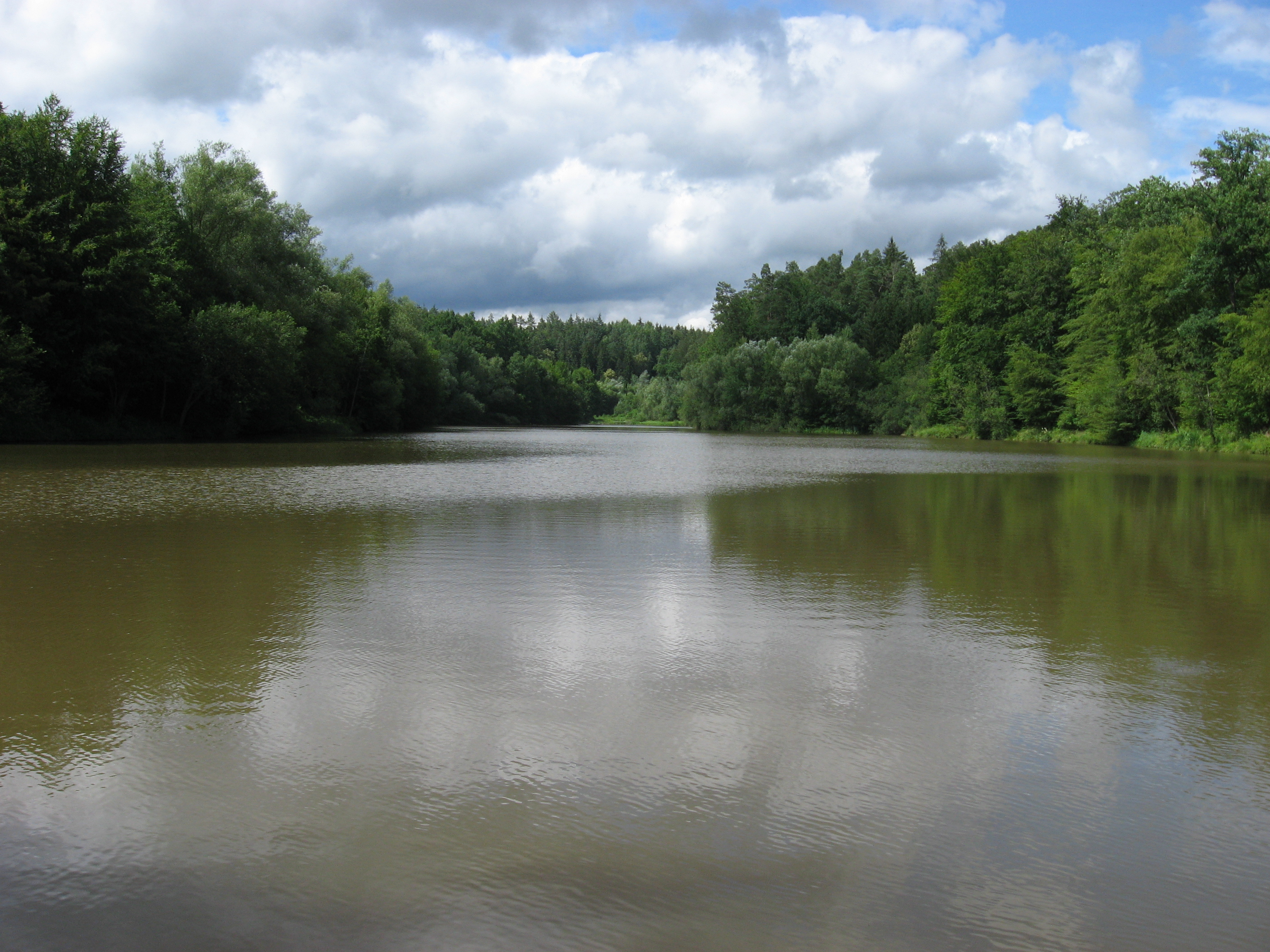 Sulzbachstausee zwischen Schönaich und Steinenbronn